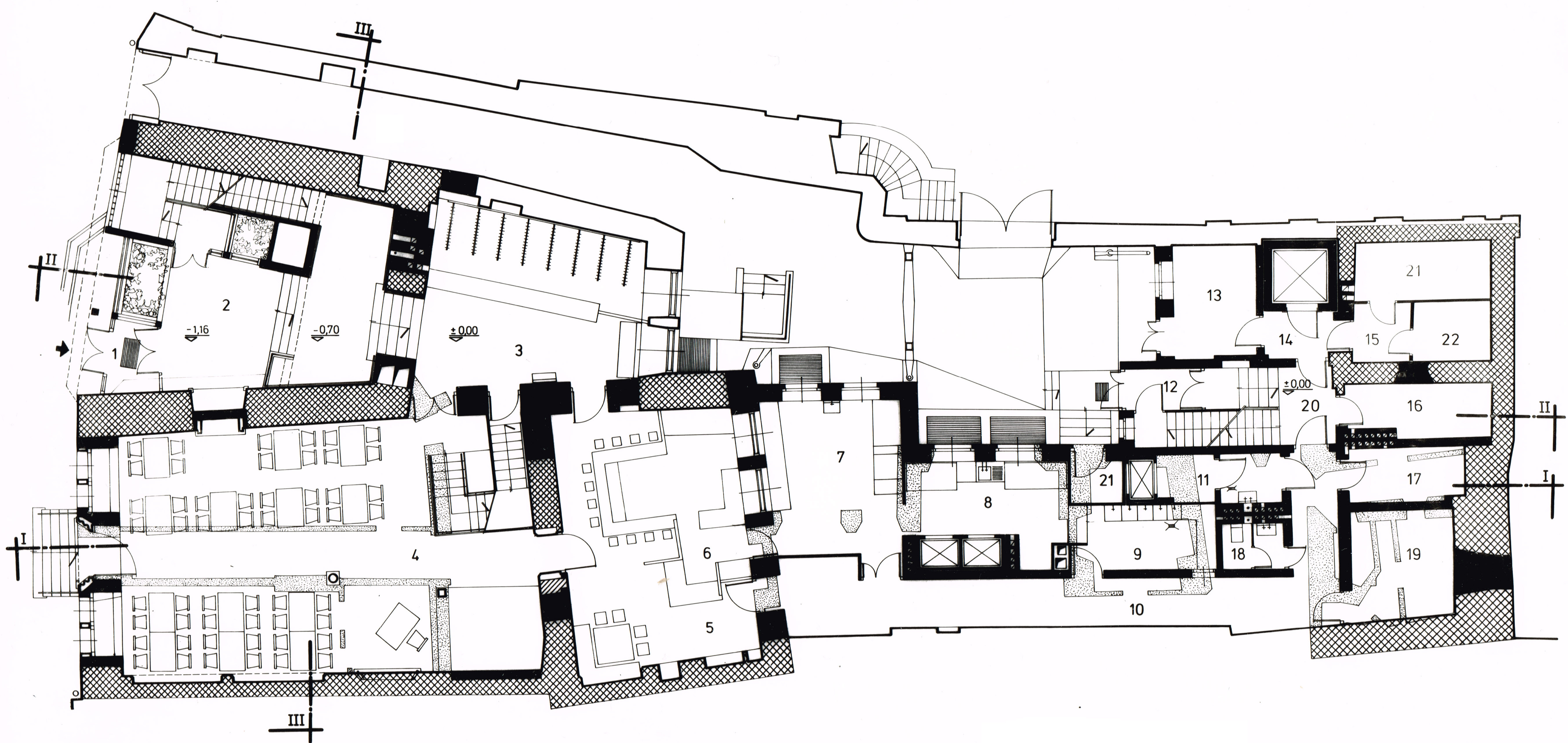 Rysunek z projektu adaptacji kamienic na zespół gastronomiczny Kafe Gnom